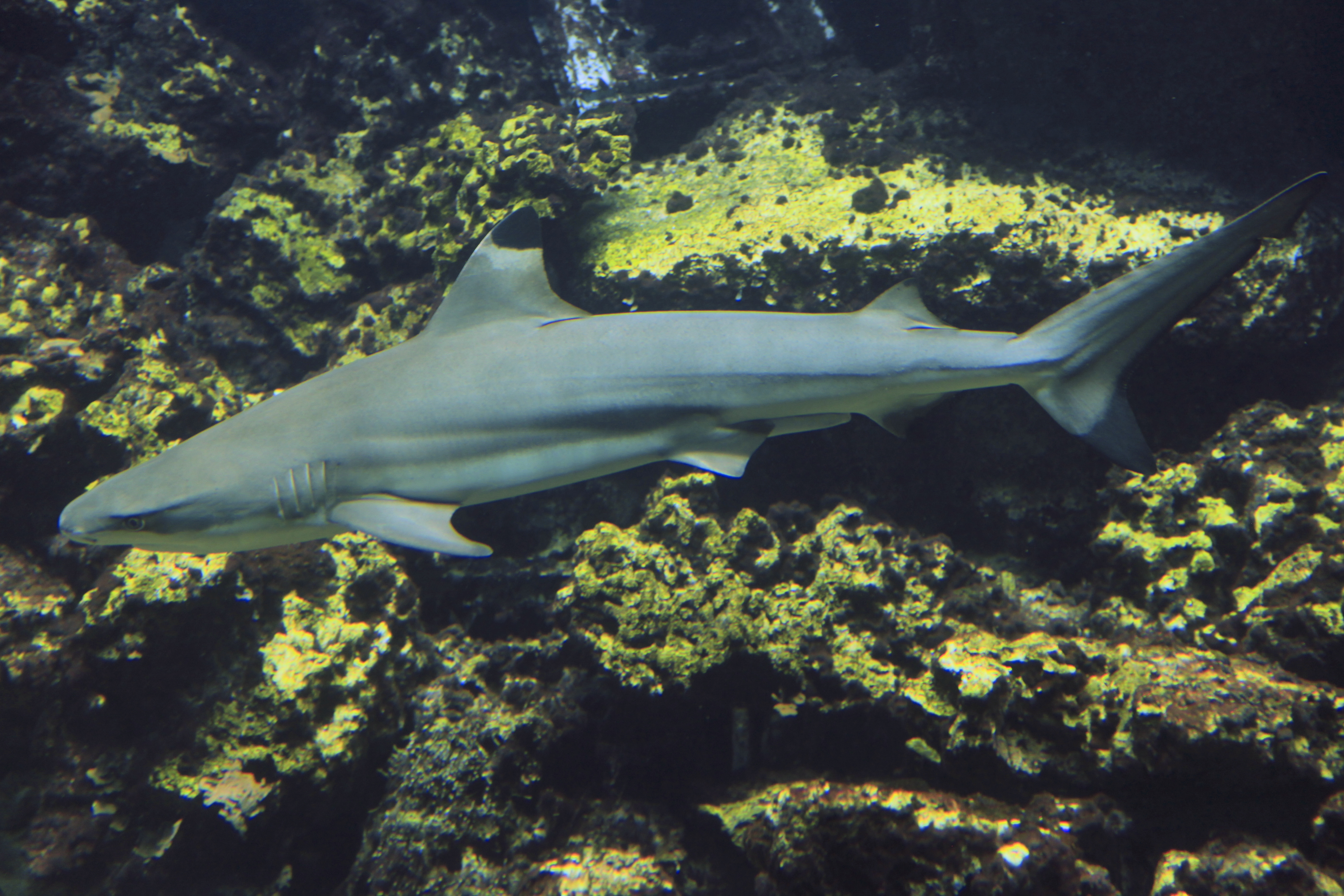 Carcharhinus melanopterus im Tierpark an der Klinikstraße in Bochum